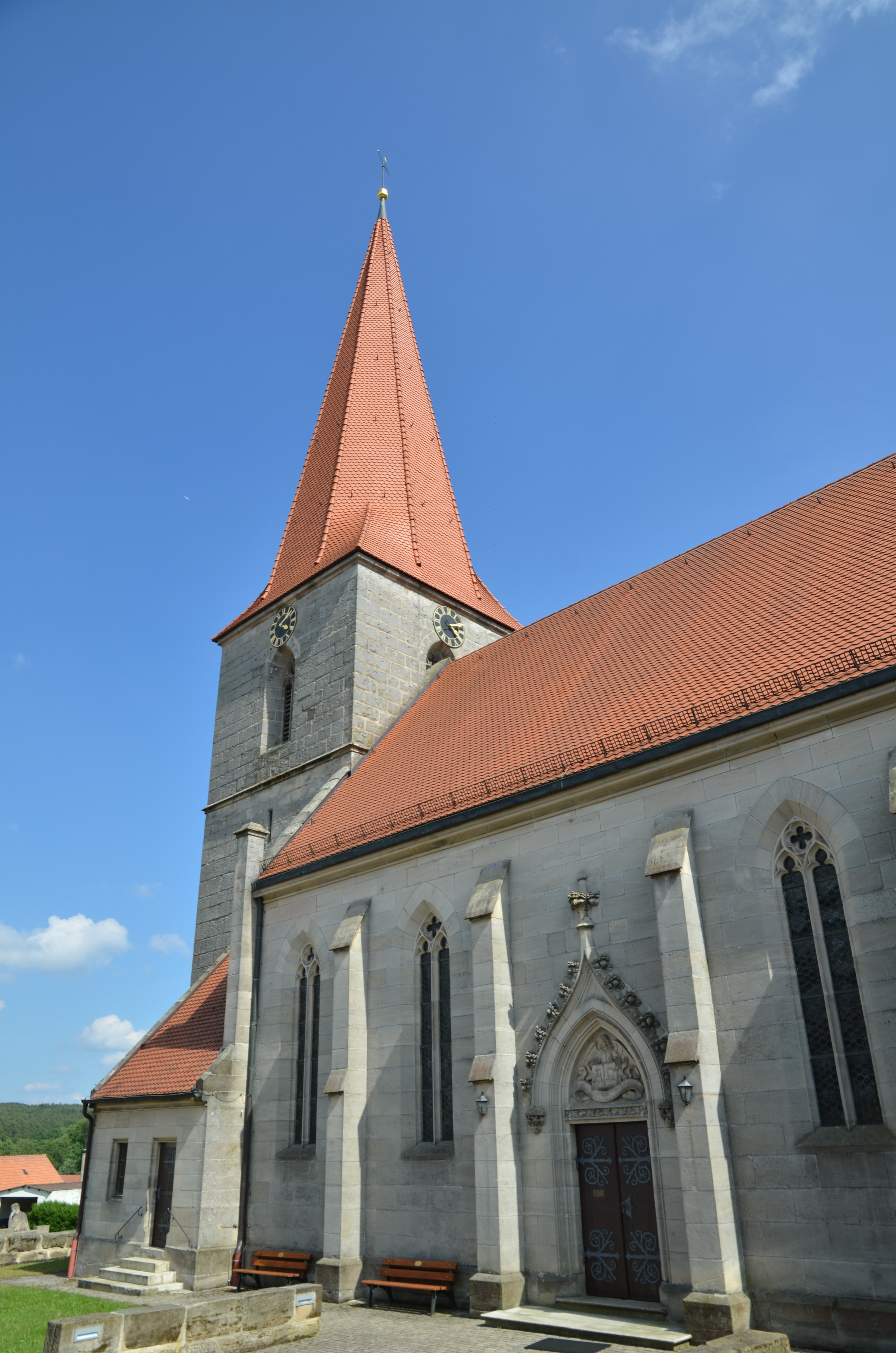 evang.-luth Kirche St. Peter und Paul in Kirchfarrnbach